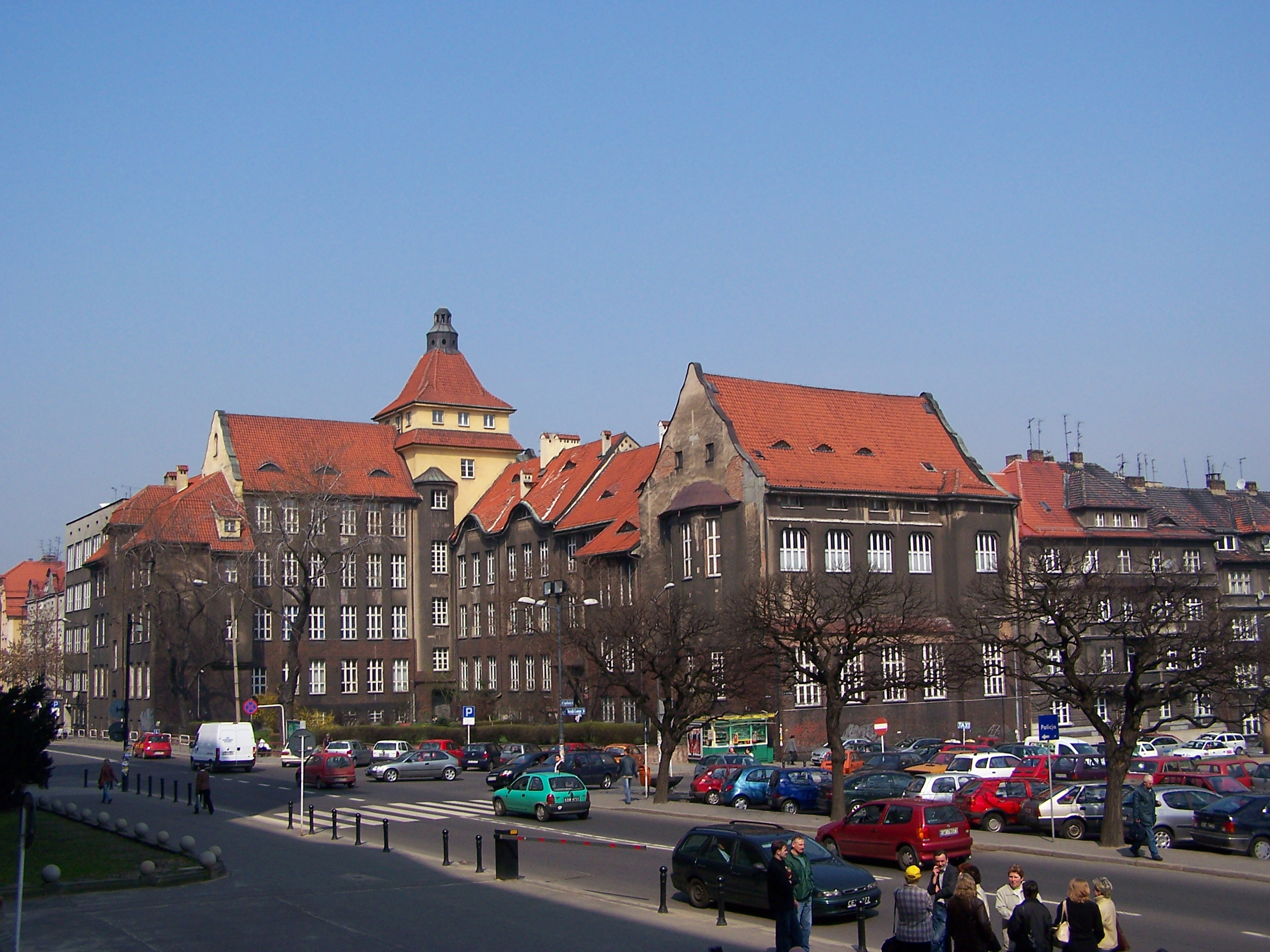 Katowice, ul. Jagiellońska 28 - budynek Wydziału Biologii Uniwersytetu Śląskiego (zabytek nr A/1371/88 z 27.09.1988)